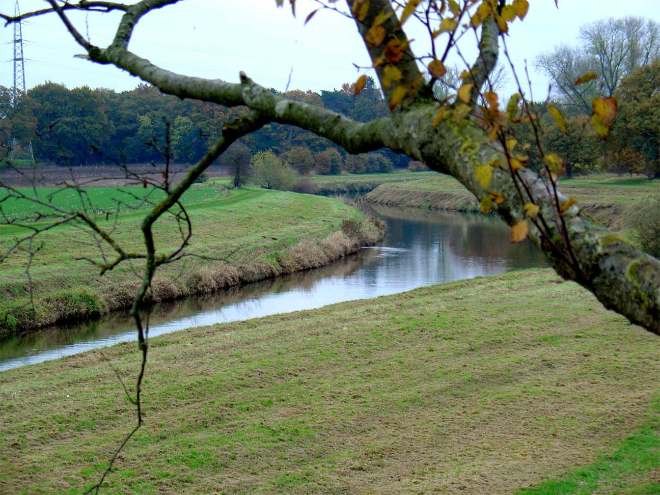 De Vecht bij Hoogstede